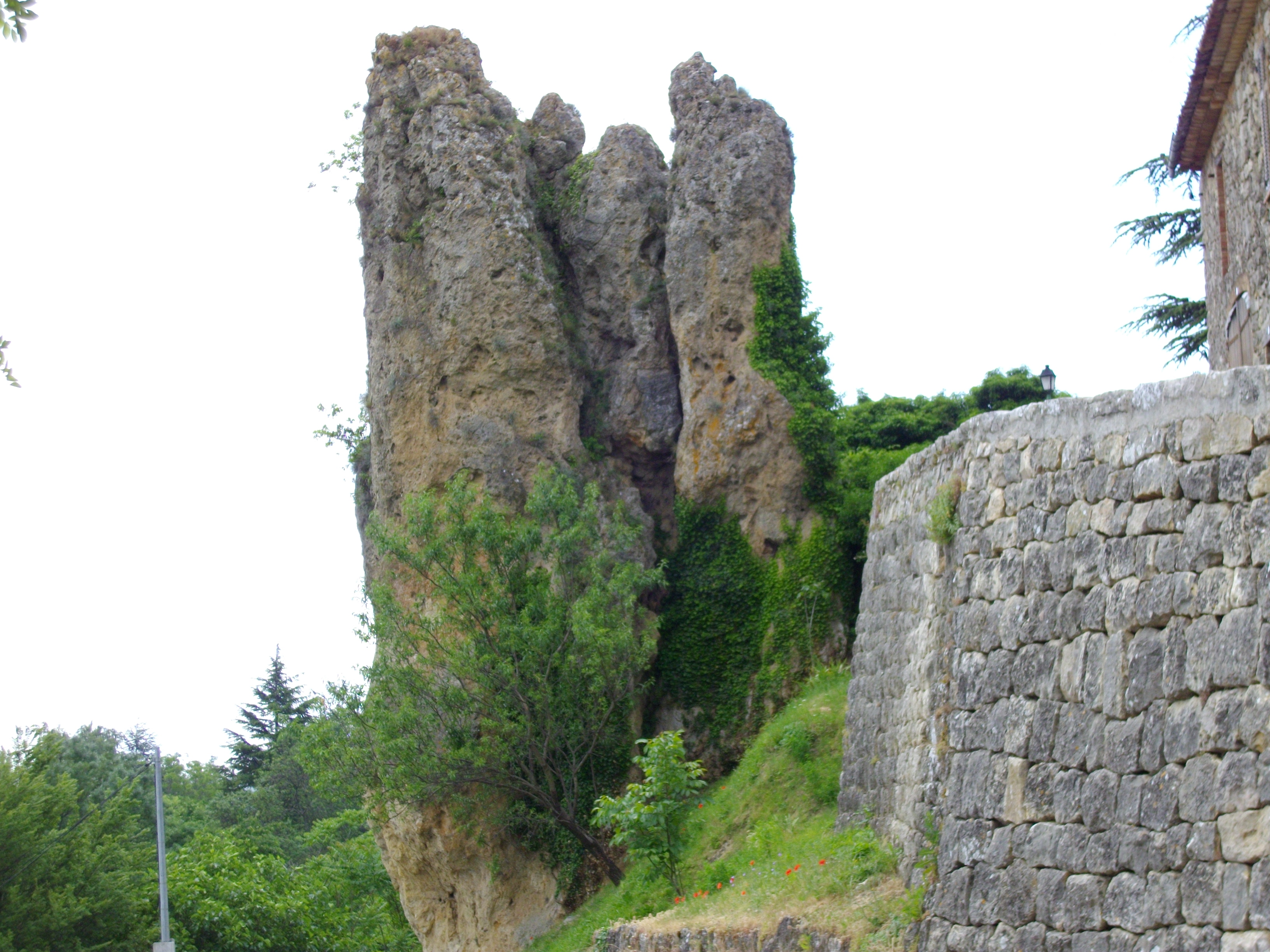 Ampus (Var), Rocher dit « Roche-Aiguille », à la sortie du village, mégalite de tuf calcaire façonné par la Nature.